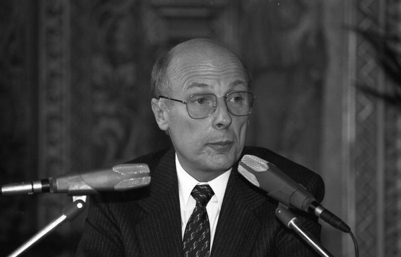 29.9.1987 Einweihung des neuen Seminargebäudes der Bundesakademie für öffentliche Verwaltung des Bundesministeriums des Innern durch Staatssekretär Franz Kroppenstedt (Bundesminister des Innern), den Präsidenten der Bundesakademie, Alfred Dimpker und den Minister des Innern und für Sport des Landes Rheinland-Pfalz, Rudi Geil, in Boppard.